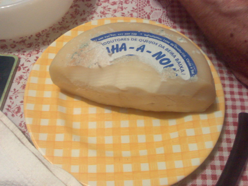 Queijo de Idanha (Portugal). Cheese from Idanha (Portugal)